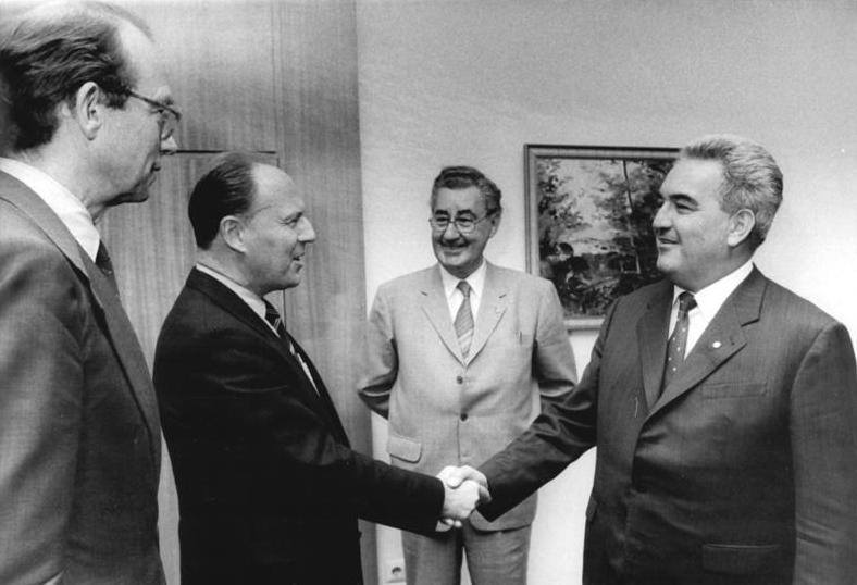 ADN-ZB Senft 30.6.88 Berlin: Gespräch im Ministerrat Der Stellvertreter des Vorsitzenden des Ministerrates der DDR, Günther Kleiber (r.), Mitglied des Politbüros des ZK der SED, empfing den zu einem Besuch in der DDR weilenden Bundesminister für Verkehr der Bundesrepublik Deutschland. Dr. Jürgen Warnke (2.v.l), zu einem Gespräch. Daran nahmen der Minister für Verkehrswesen der DDR, Otto Arndt (2.v.r.), sowie Leiter der Ständigen Vertretung der BRD in der DDR, Dr. Hans-Otto Bräutigam (l.), teil.